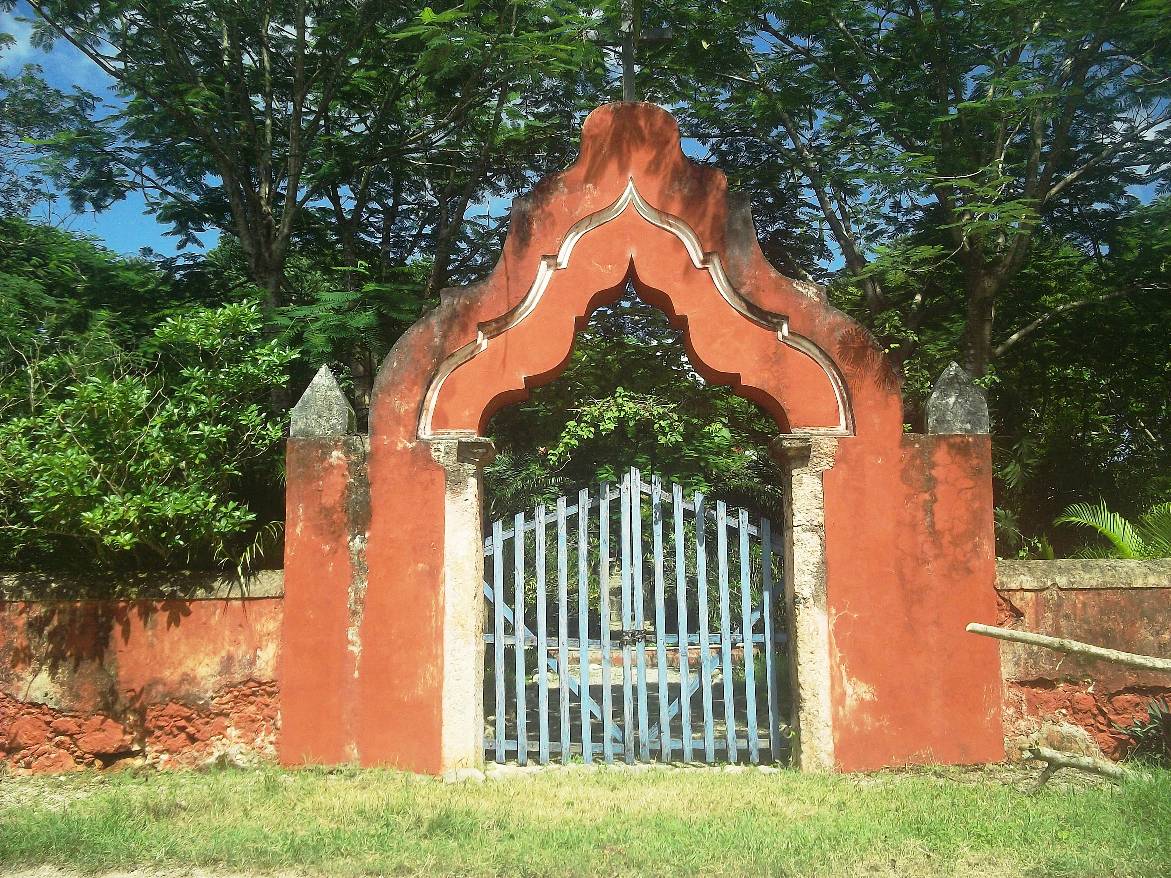 Arco de la hacienda de Dziná, Yucatán.